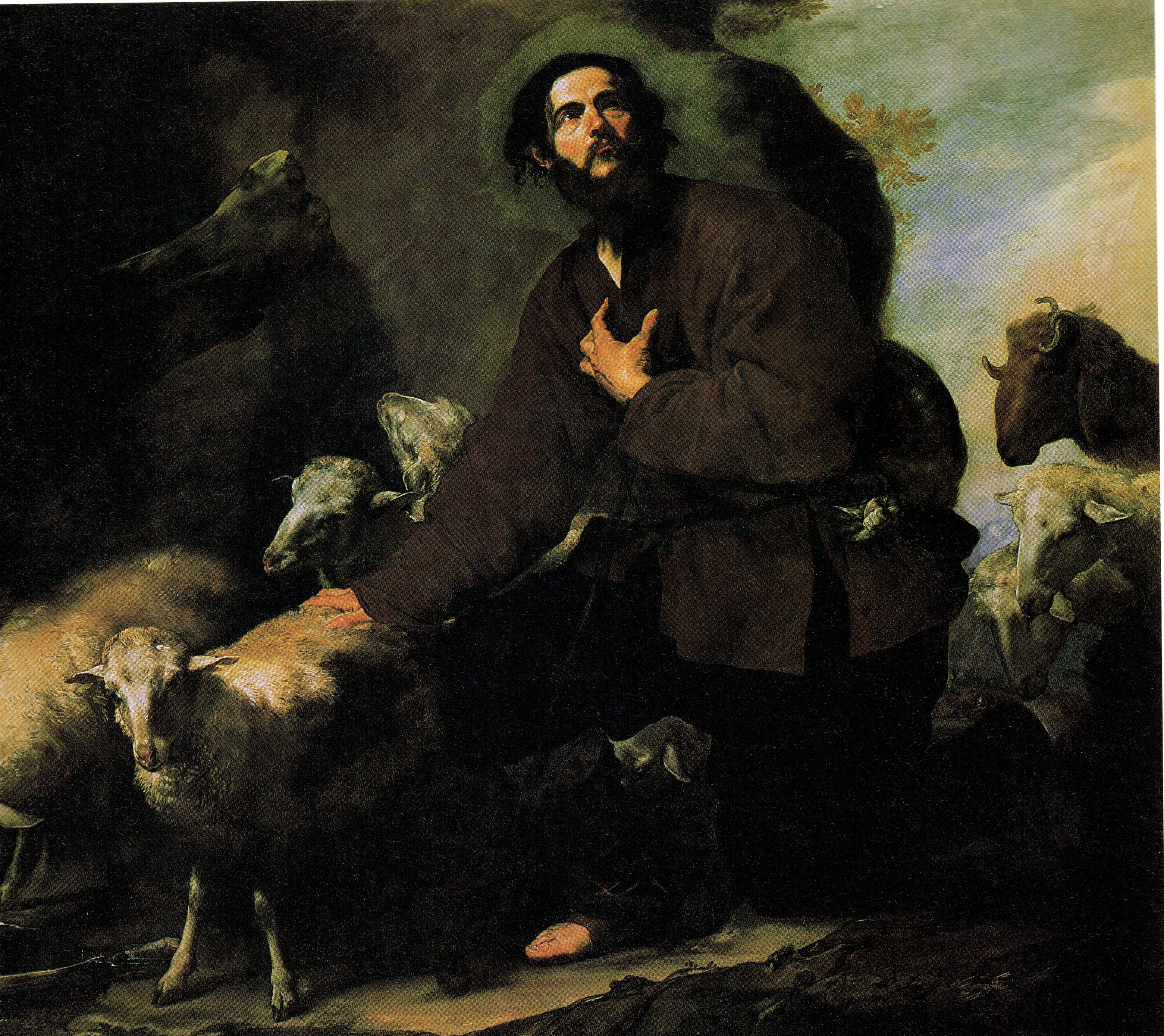 La obra representa al joven patriarca Jacob, hijo de Isaac, custodiando el rebaño de Labán cuando era joven.